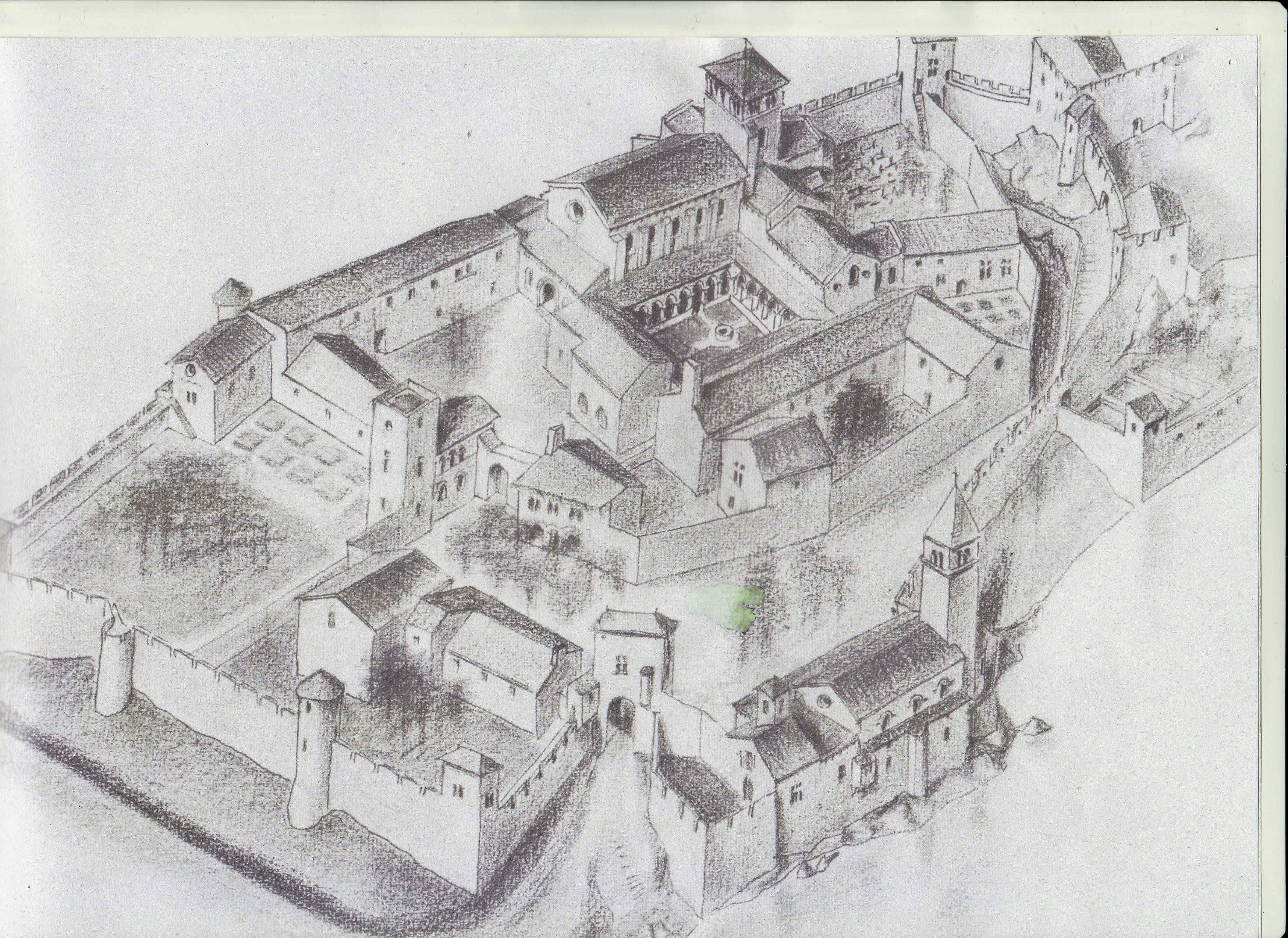 reconstitution sous forme de maquette de l'île Barbe du temps de l'abbaye